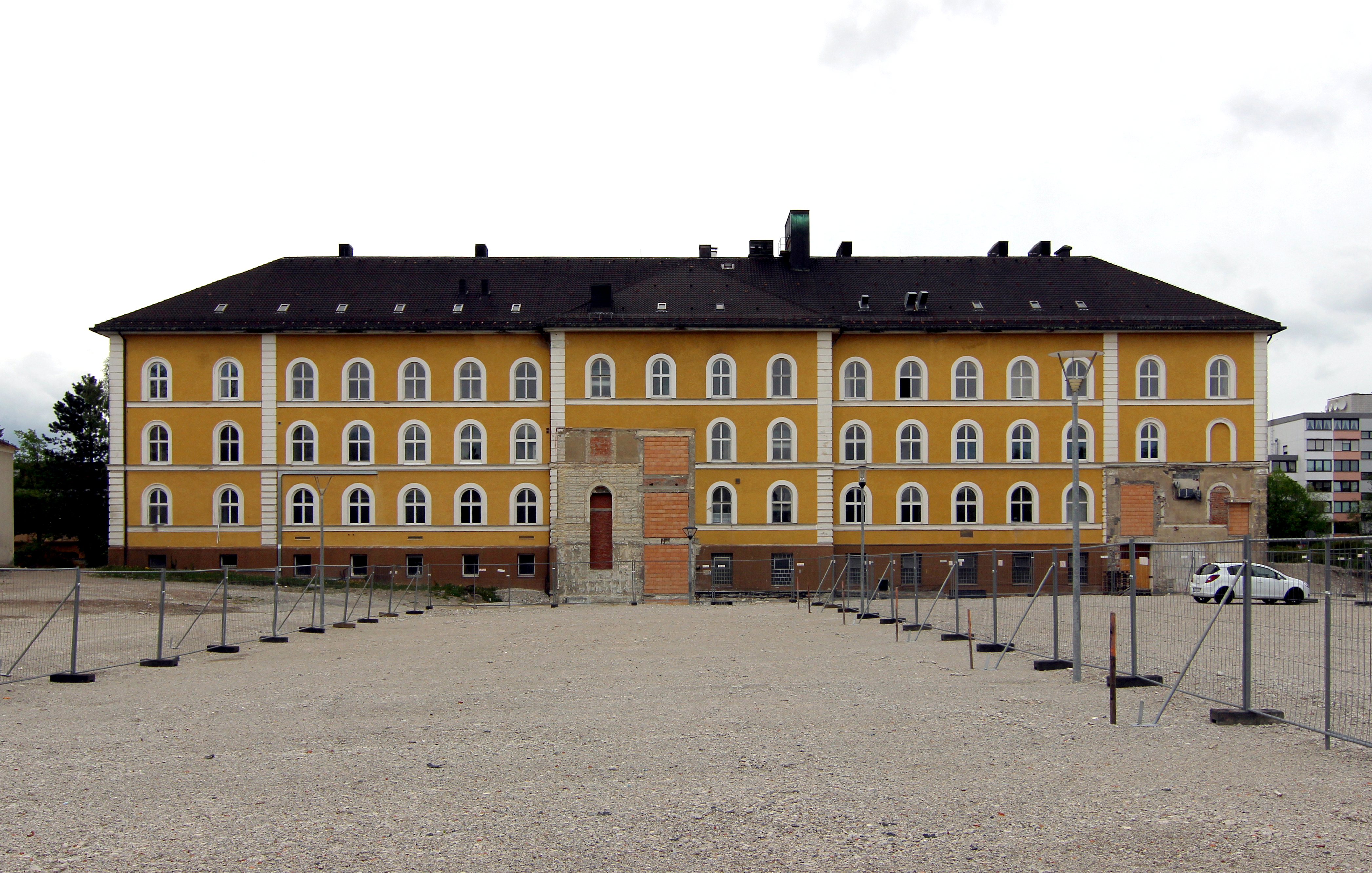 Ehemaliges Kreiskrankenhaus in Kempten Anbau der 70er bereits abgebrochen. Zugang erfolge über die mit Ziegeln zugemauerte Öffnung in der Gebäudemitte.